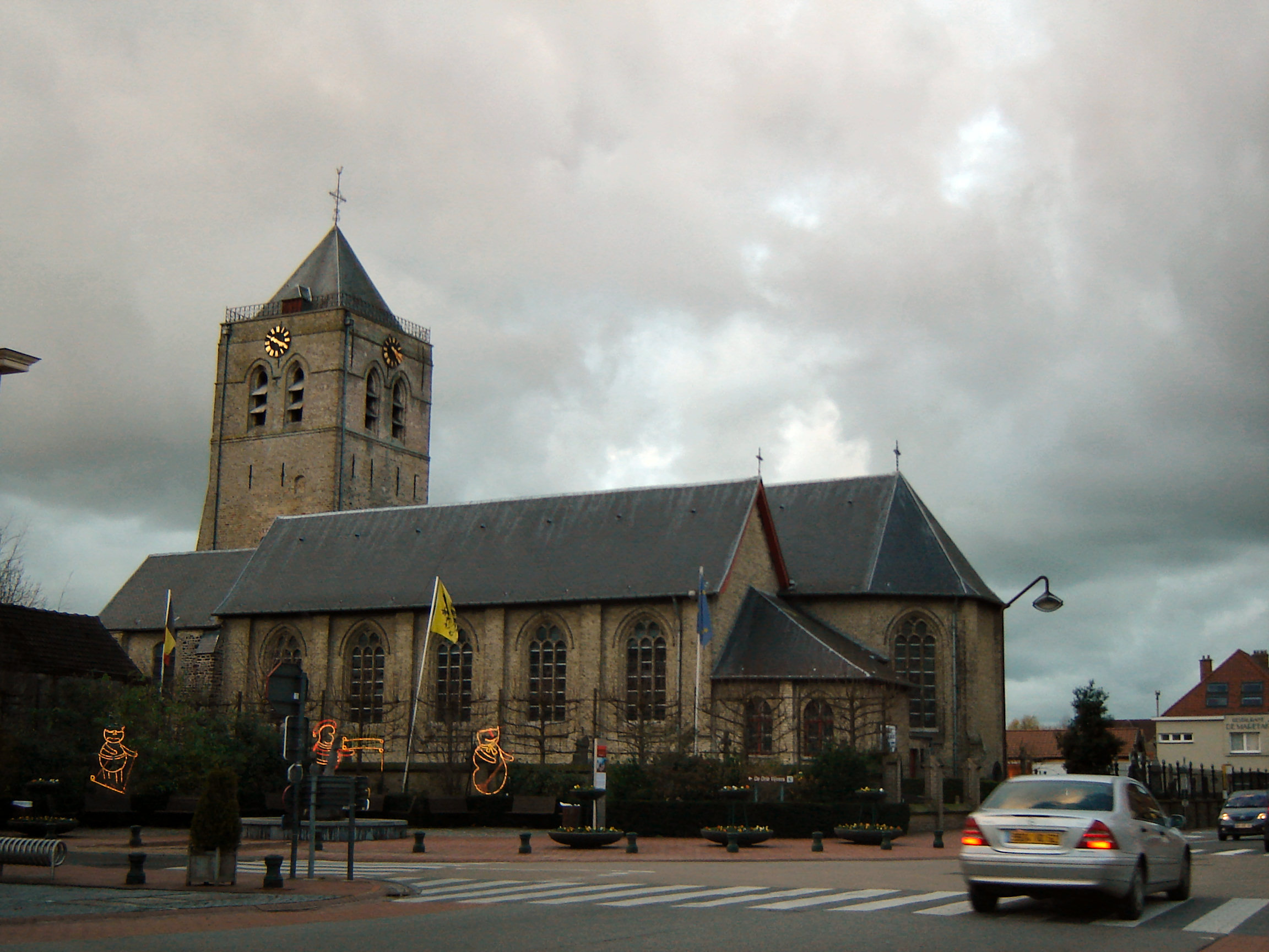 Sint Audomaruskerk in Adinkerke, De Panne. Saint Audomar Church in Adinkerke, De Panne, West-Flanders, Belgium